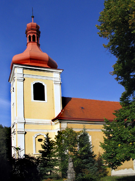 Barokně upravený kostel Zvěstování Páně v Úvalech